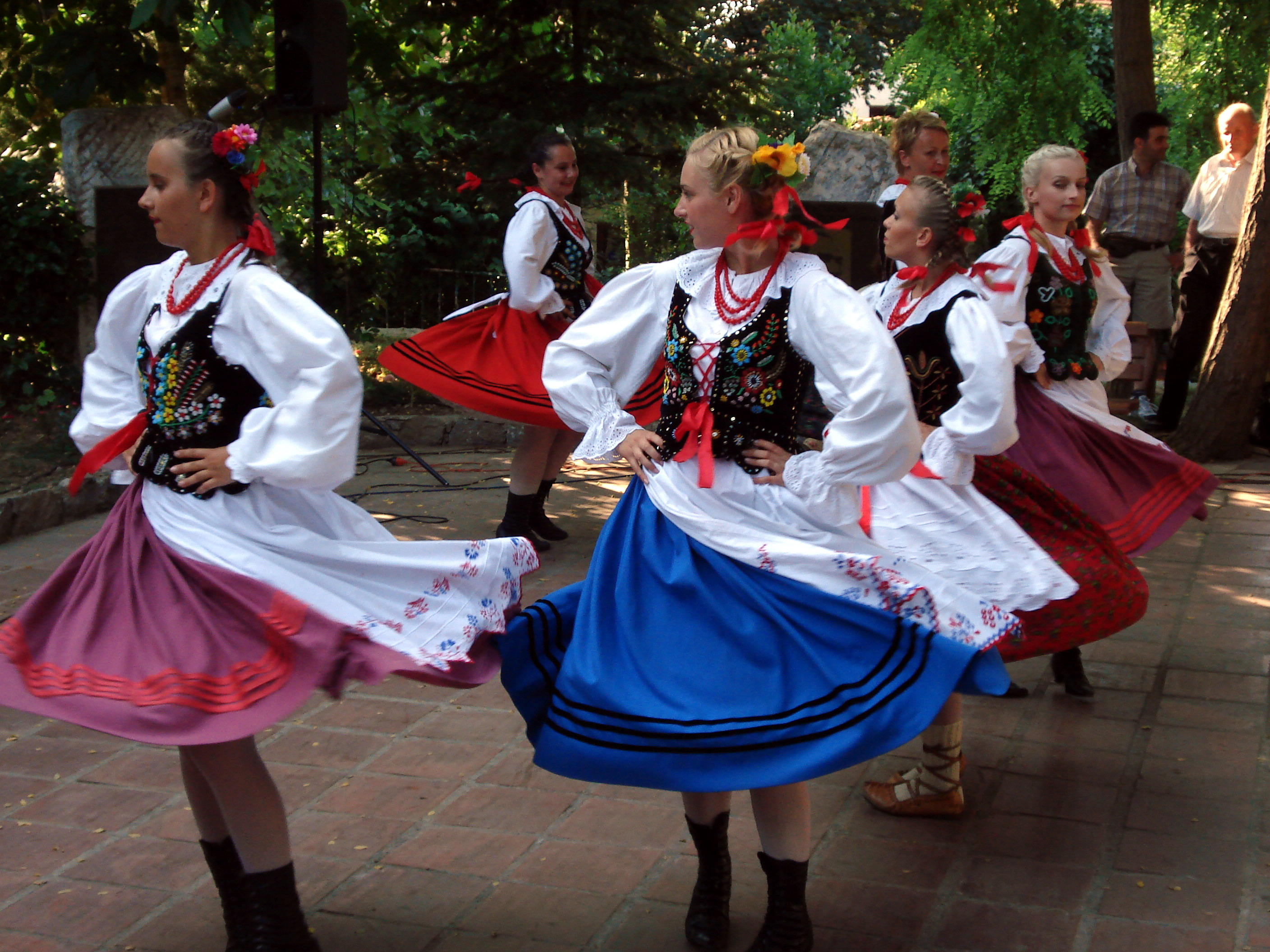 Polonezköy "Kiraz" Festival, Wałbrzych group